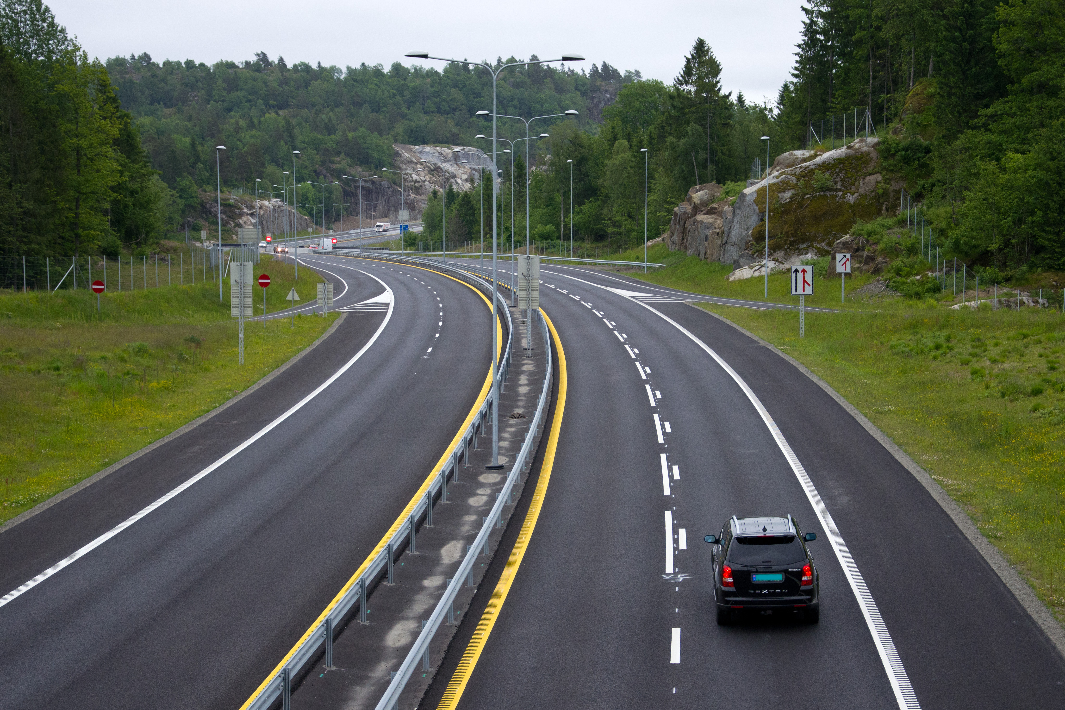 Østover fra Langangenkrysset, E18, Porsgrunn, Telemark.